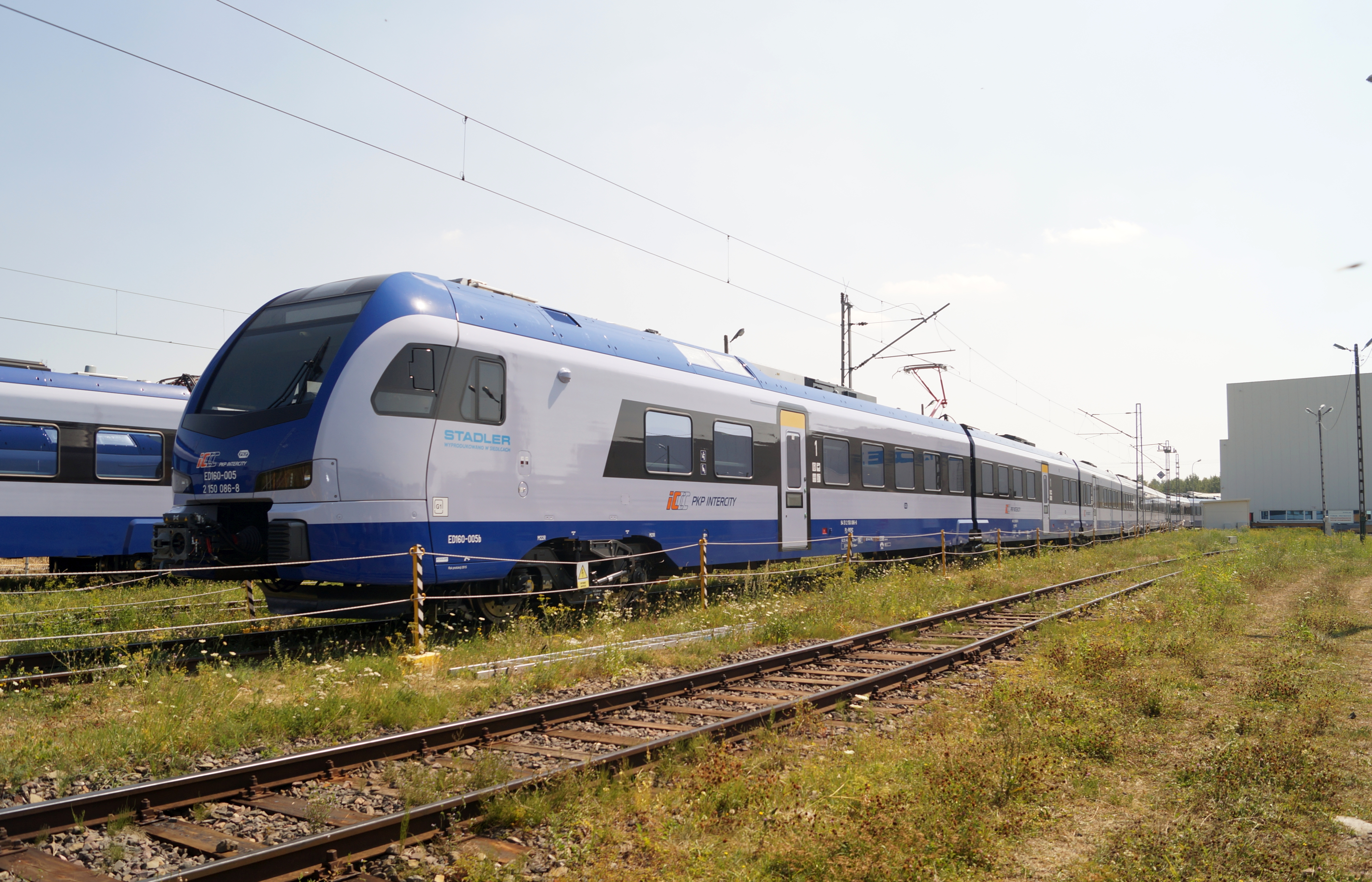 EZT Stadler FLIRT3 (ED160) dla PKP Intercity